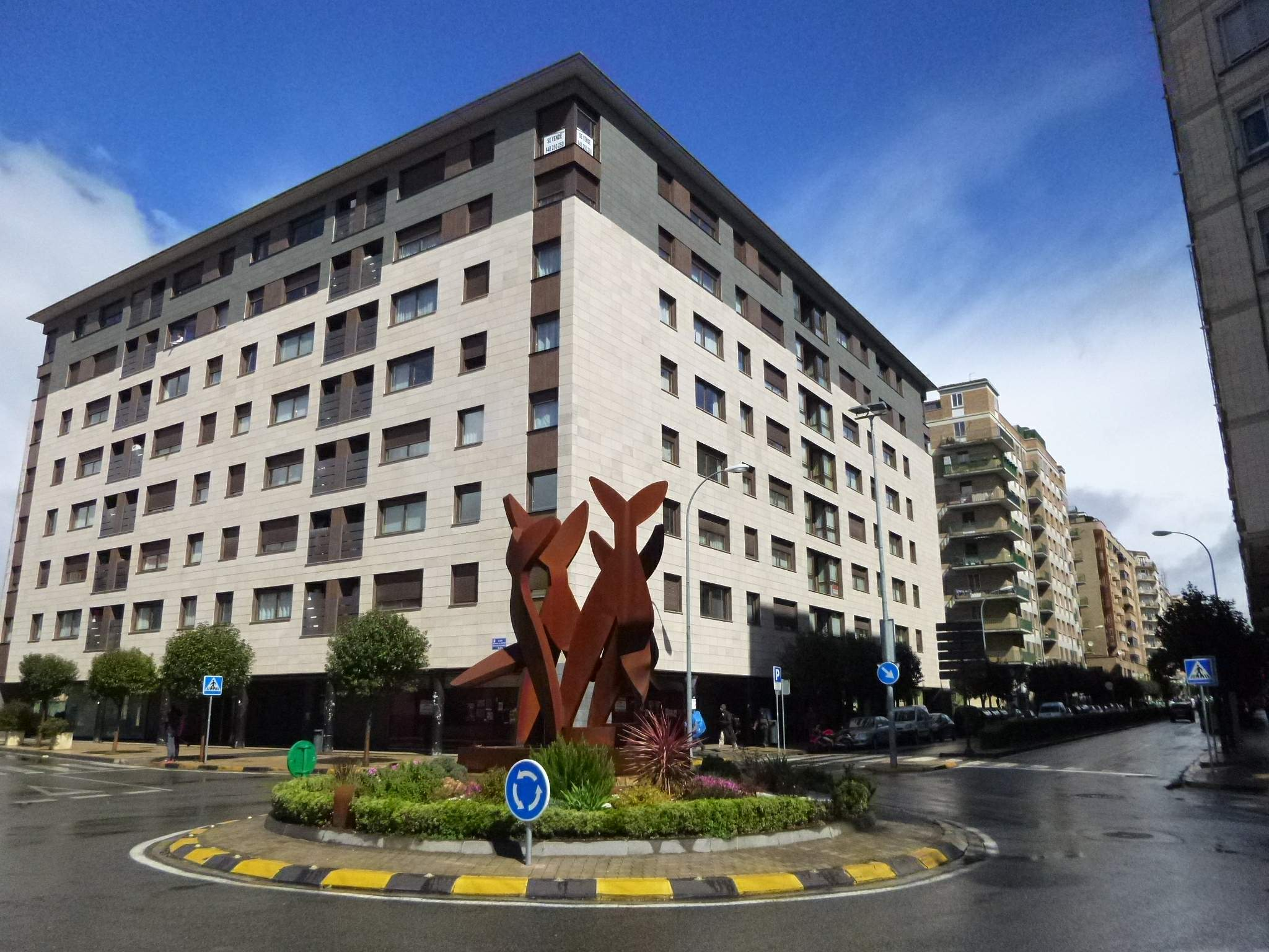 Burlada (Navarra)